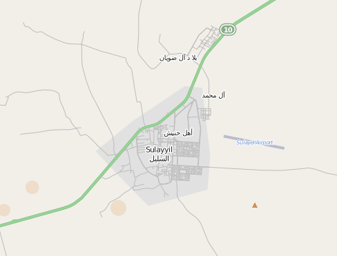 محافظة السليل بالسعودية This map may be incomplete, and may contain errors. Don't rely solely on it for navigation.